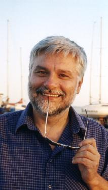 Fotografia di Alfonso Belfiore. Foto personale. Viareggio, estate 2000. Categoria:Immagini esclusivamente in GNU FDL